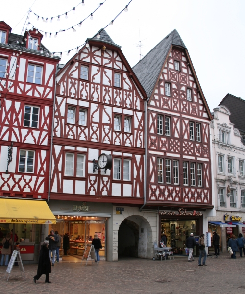 Juddepaart zu Tréier (Januar 2006)